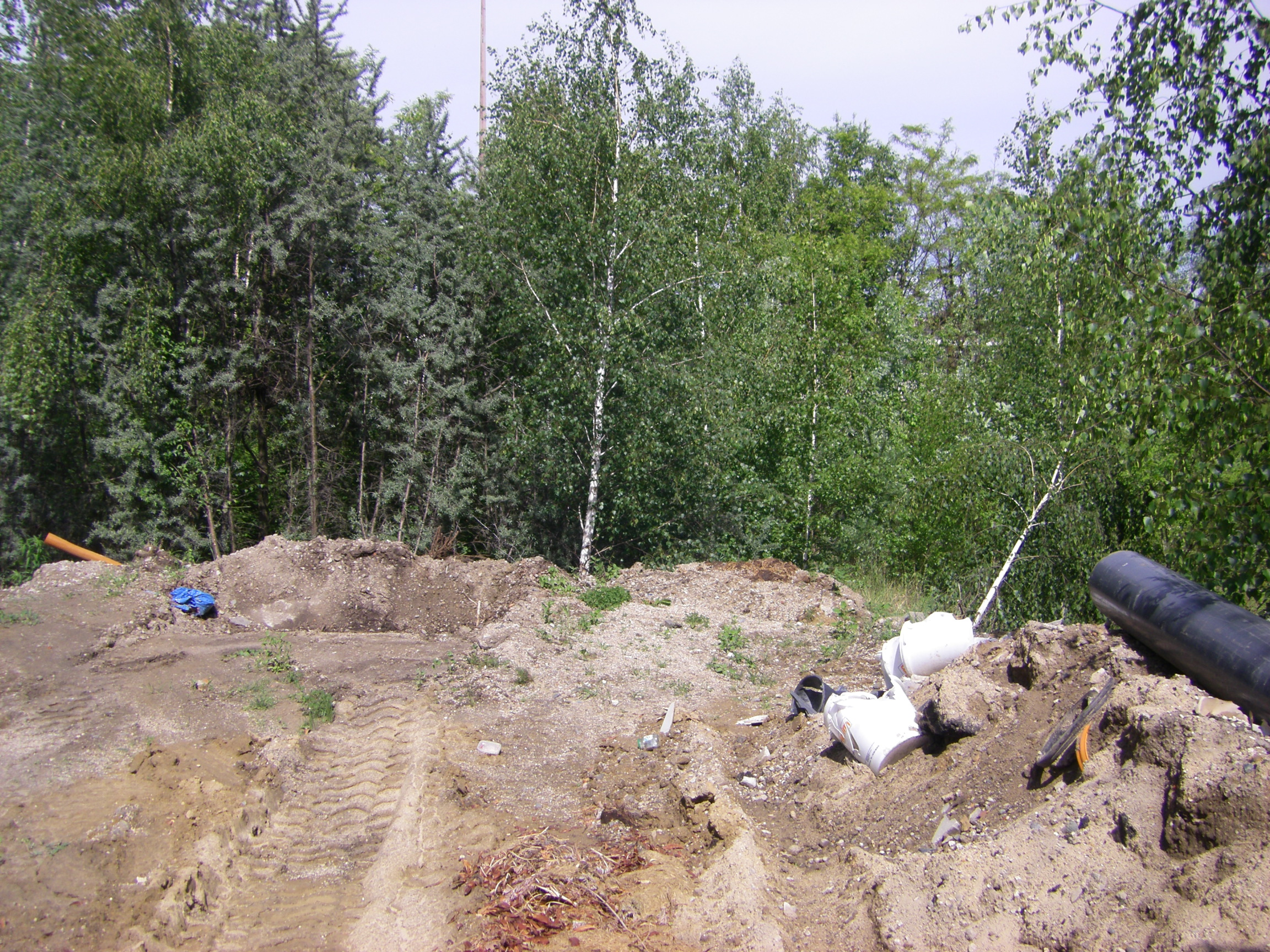 Am ehemaligen Magerviehhof Friedrichsfelde wurde, offenbar im Zuge von Natur- oder Denkmalschutzmaßnahmen, eine Fläche mit natürlichem Bewuchs planiert. Eine geplante Nutzung ist nicht erkennbar.